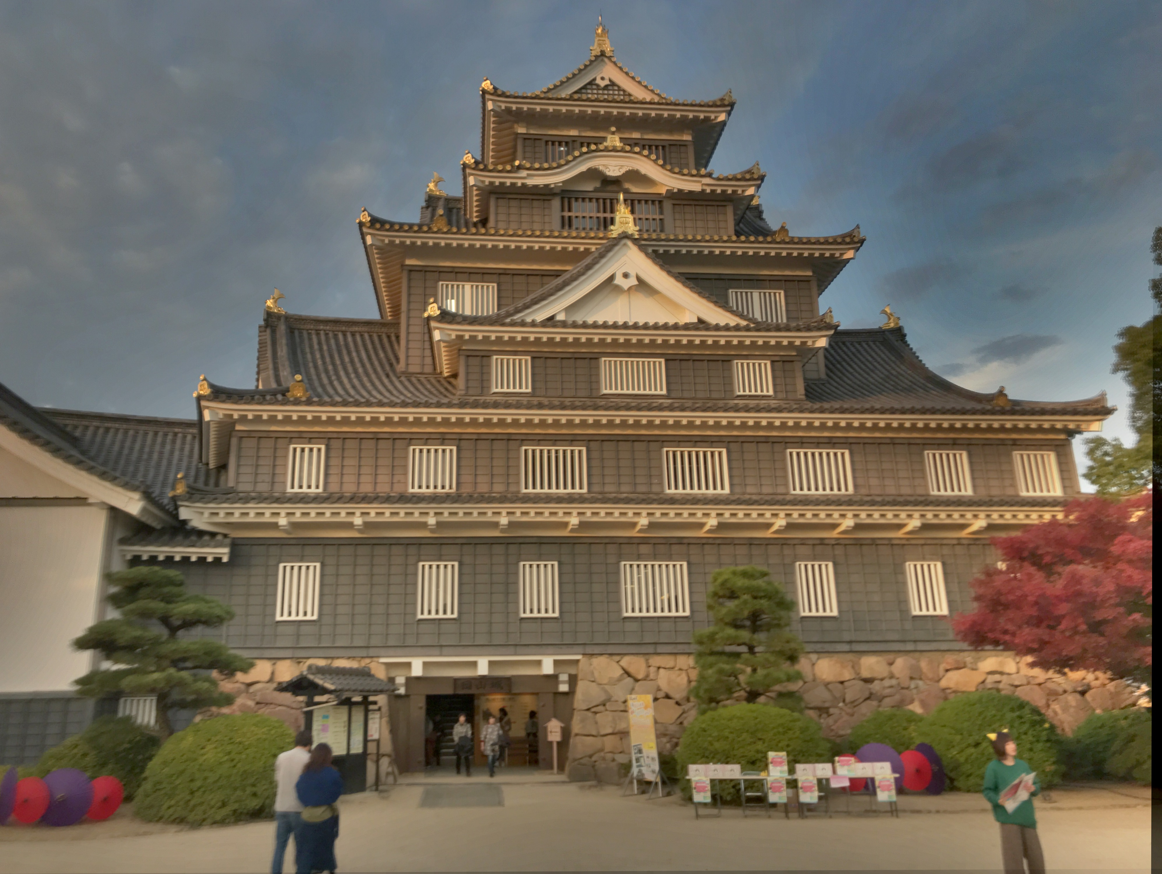 岡山県岡山市の岡山城復元天守閣(2019年撮影）